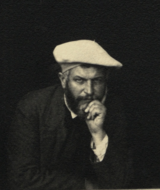 Jean Rameau a la fenetre du Pourtaou